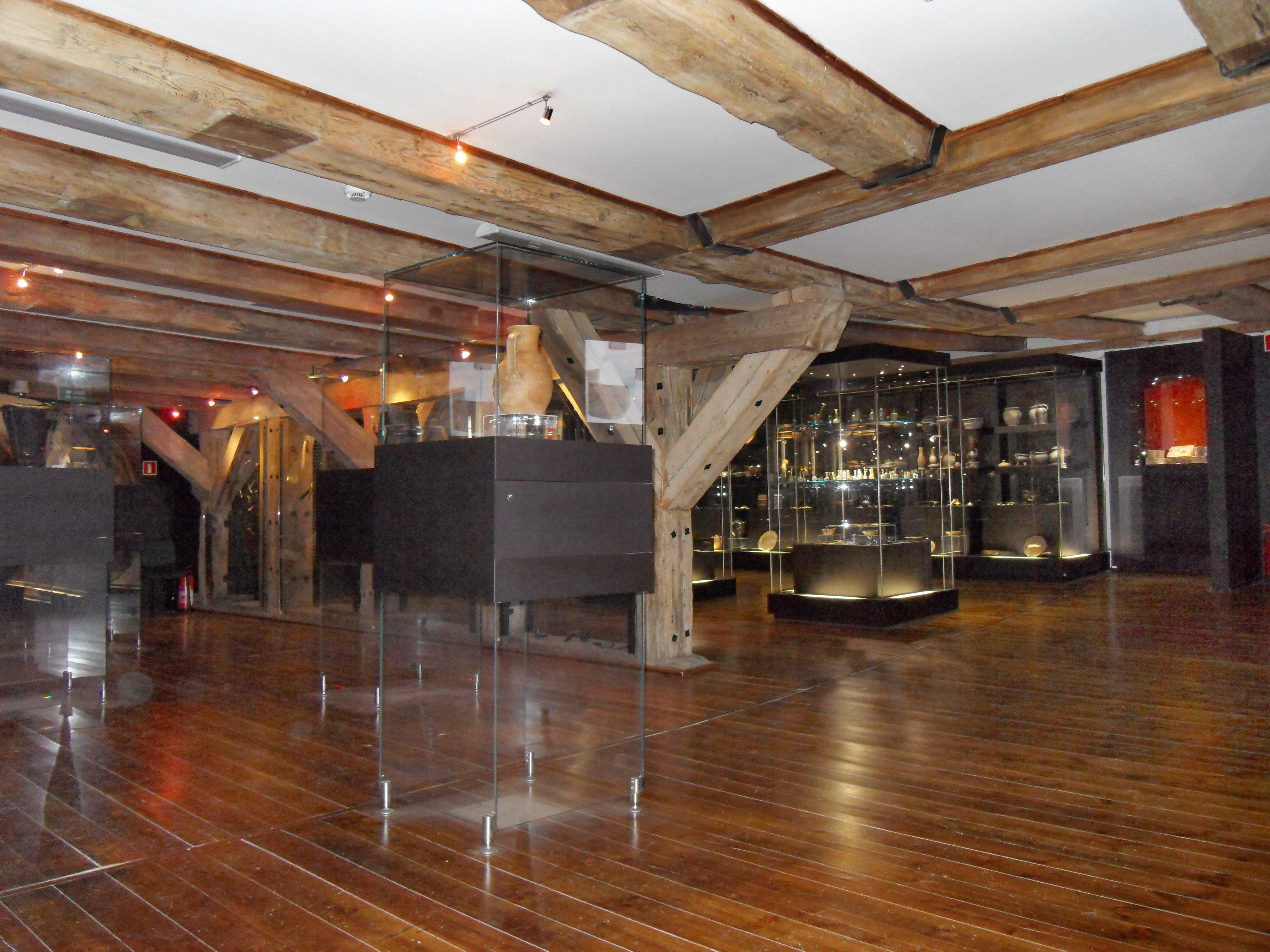 Gdańsk, Wyspa Spichrzów. Ul. Chmielna, spichlerz Błękitny Baranek - wnętrze, 2-gie piętro.